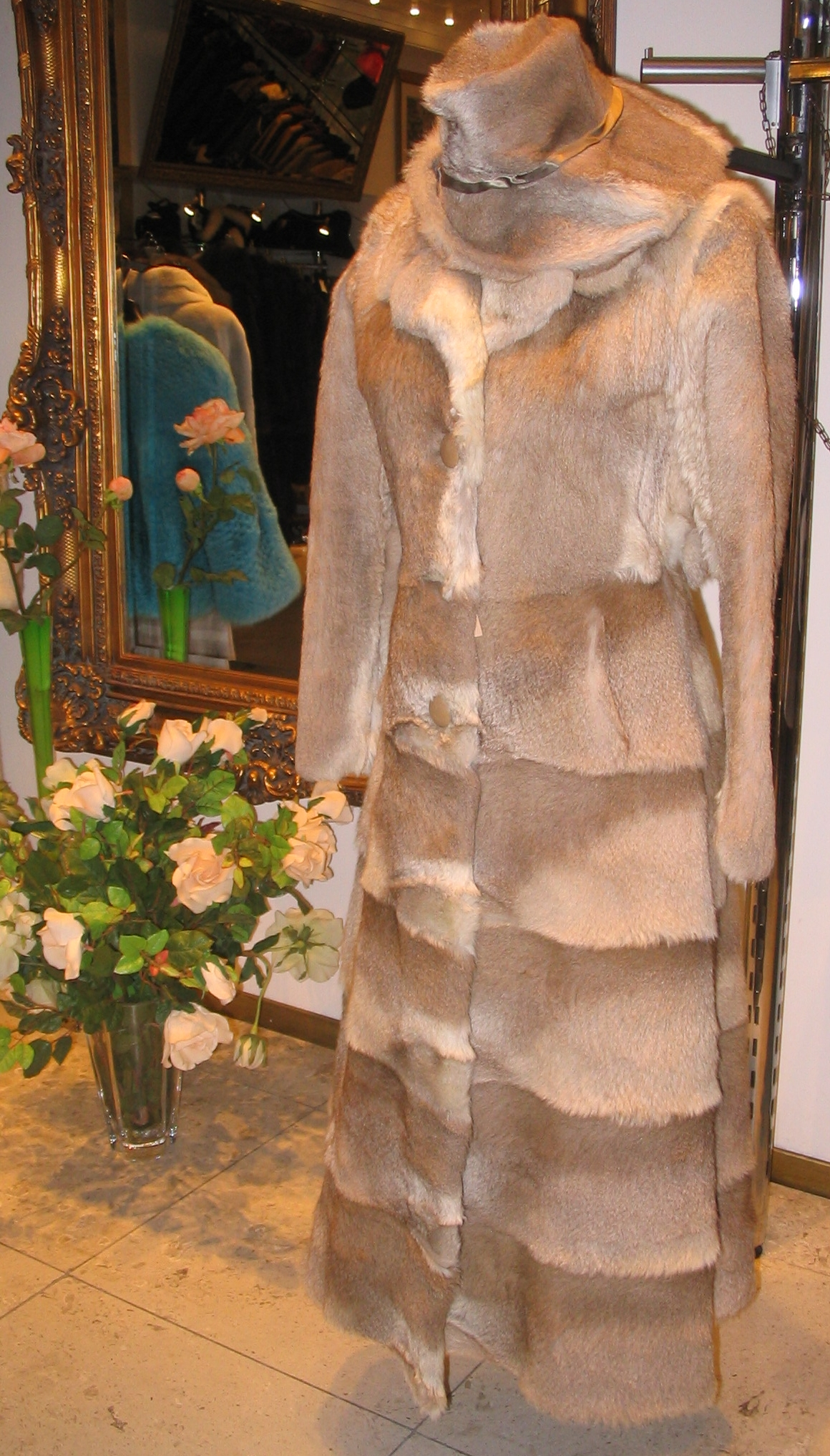 Älterer Mantel und Hut aus Kängurufell der Firma Arctic Furs, Sydney. Das Mantelunterteil ist in zwei Stufen mit Reißverschlüssen zu kürzen.